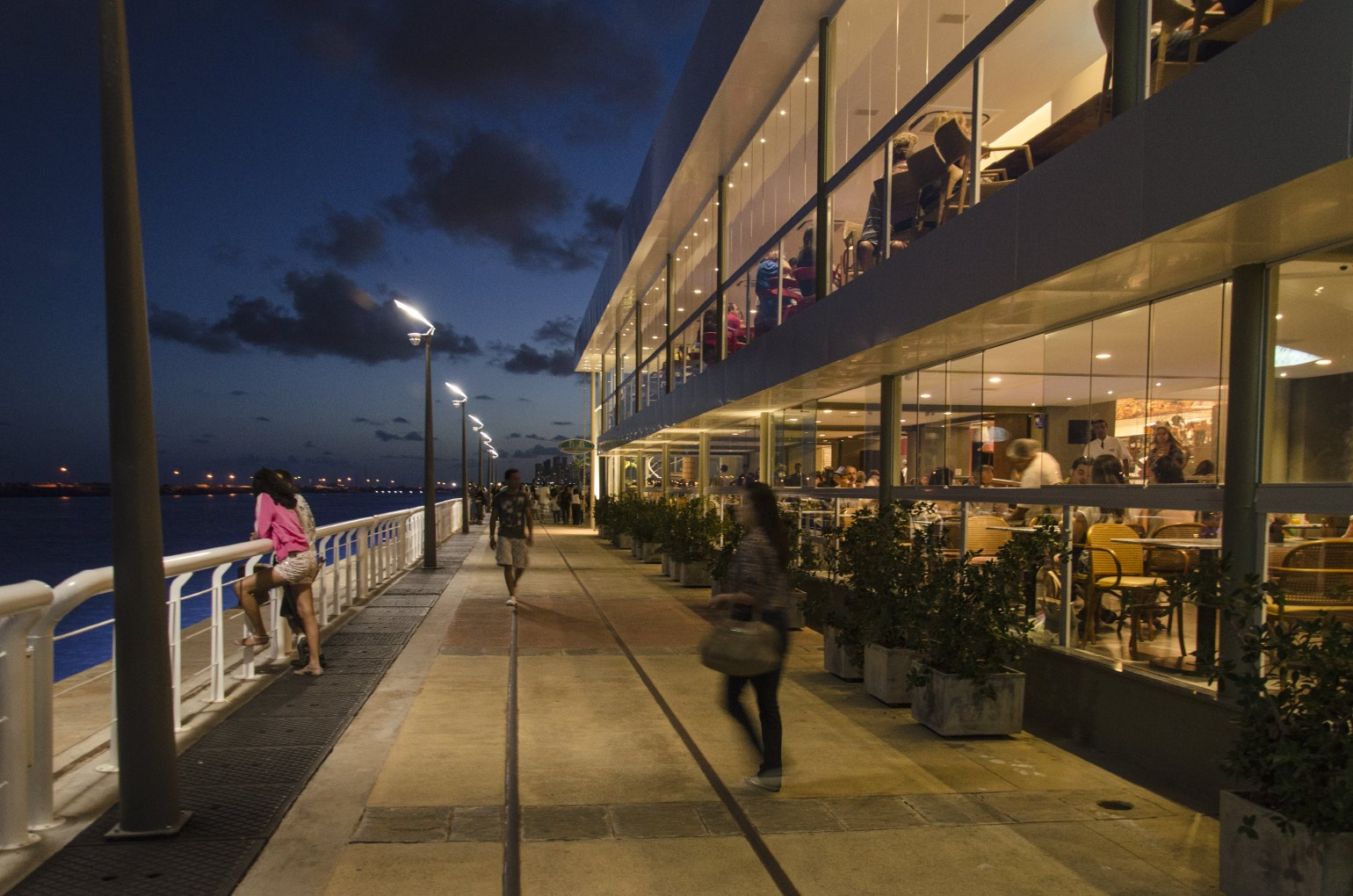 Centro de Artesanato de Pernambuco (Cape) do Porto do Recife, que conta com restaurante, loja, galeria de arte e mostra permanente. Recife - Pernambuco - Brasil